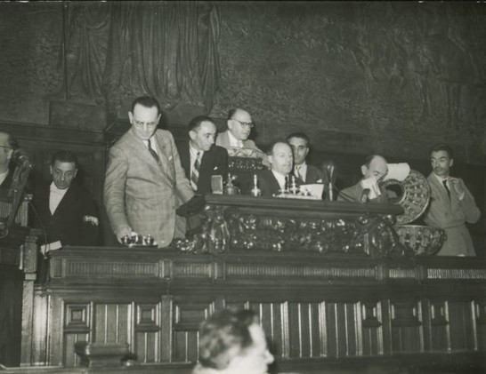 Prima seduta dell'Assemblea costituente ed elezione dei membri dell'Ufficio di Presidenza provvisorio